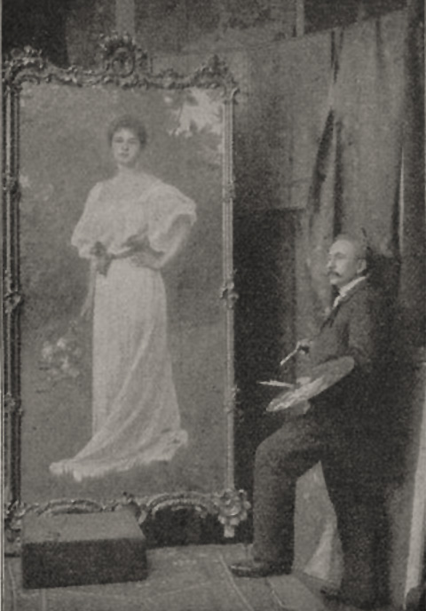 "Professor Konrad Kiesel, ein bekannter Porträtmaler, ist der Vorsitzende der Jury der Großen Berliner Kunstausstellung, die demnächst eröffnet wird. Professor Kiesel ist geboren am 19. November 1846 in Düsseldorf, wo er bis 1883 wirkte. Seit 1885 lebt er in Berlin. Der Künstler ist unter anderem Schöpfer des Porträts der deutschen Kaiserin, das im Arbeitszimmer des Kaisers im Berliner Schloss hängt. Er ist ordentliches Mitglied der Akademie der Künste in Berlin." (Text der Redaktion Rhein und Düssel: illustrierte Wochenschrift zum Düsseldorfer General-Anzeiger No. 21, vom 23. Mai 1909 zu dem Bild "Professor Konrad Kiesel")